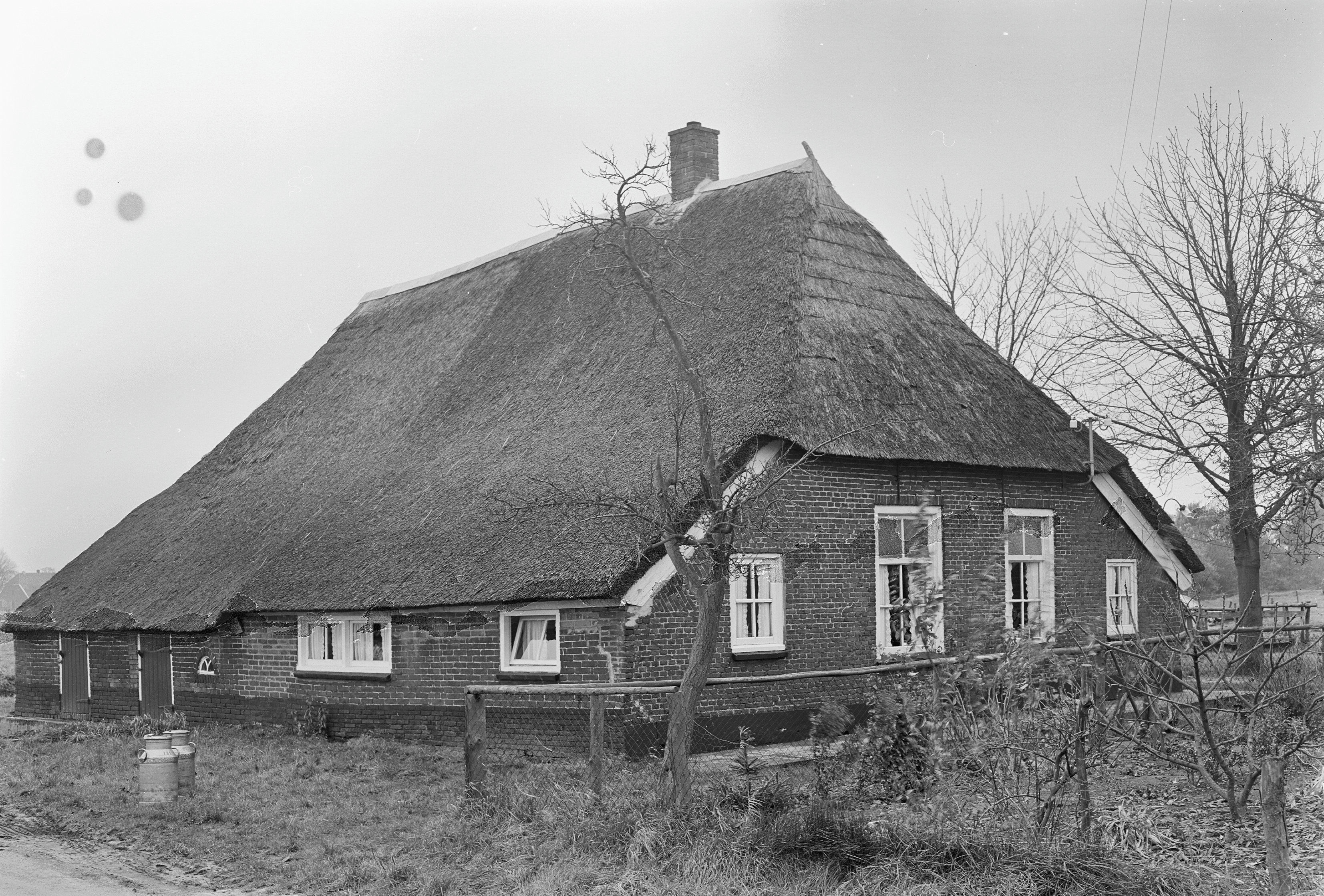 achter- en zijgevel